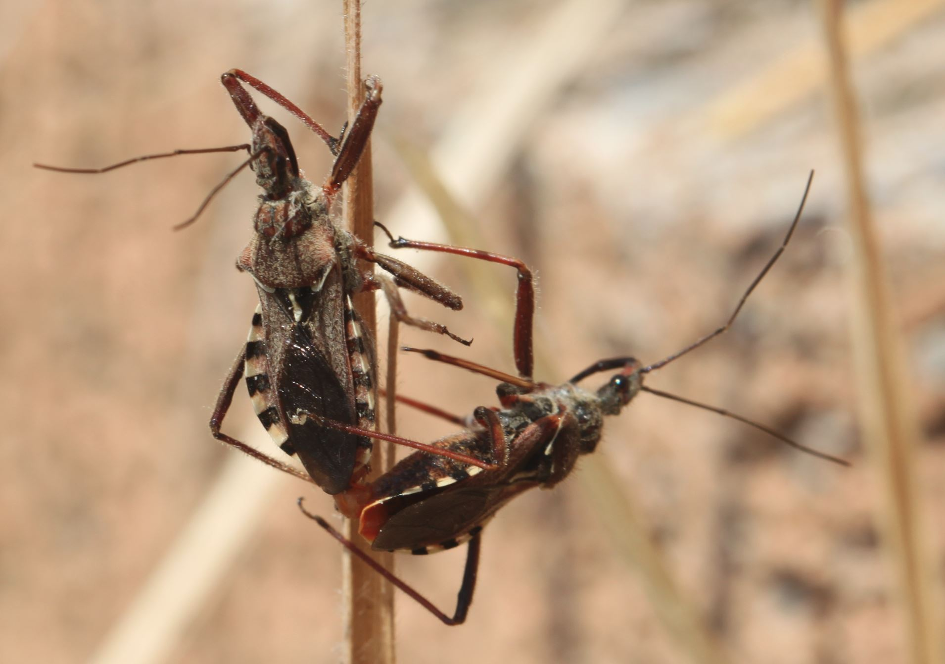 Paarung von Rhynocoris erythropus, am 30. Juni 2019 an der Côte d’Azur